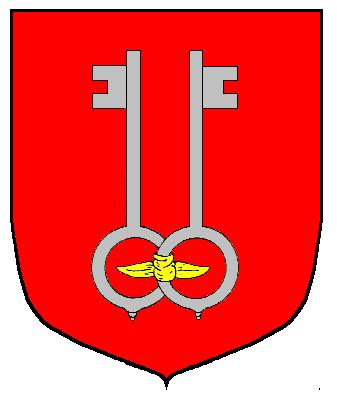 Escut dels barons de Claverol (Conca de Dalt, Pallars Jussà)